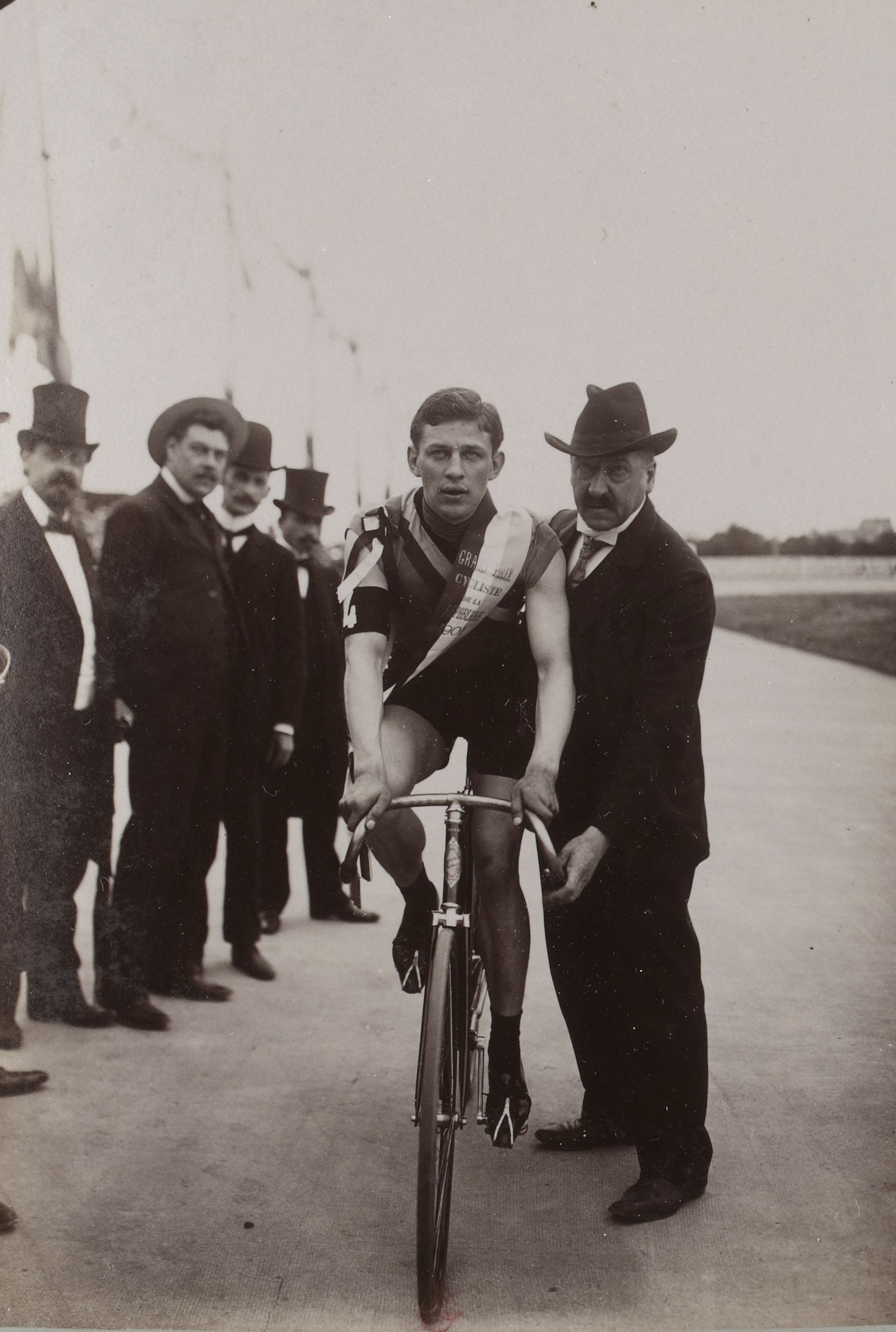 [Collection Jules Beau. Photographie sportive] : T. 14. Année 1901 / Jules Beau : F. 12v. [Grand Prix cycliste de la République, 23, 27, 30 juin 1901] ; Willy Arend ; Maurice Garin